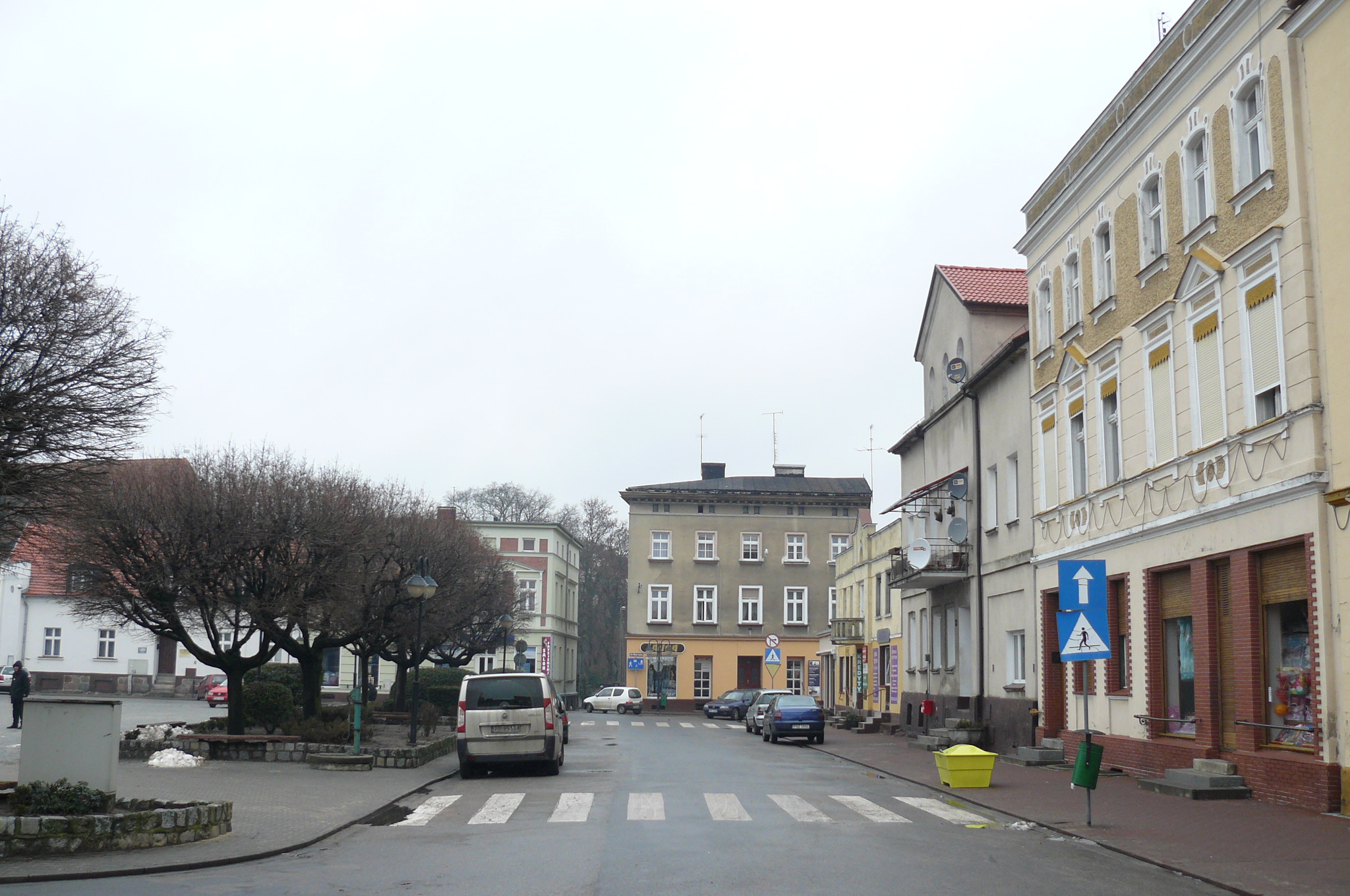 Pniewy, Rynek.